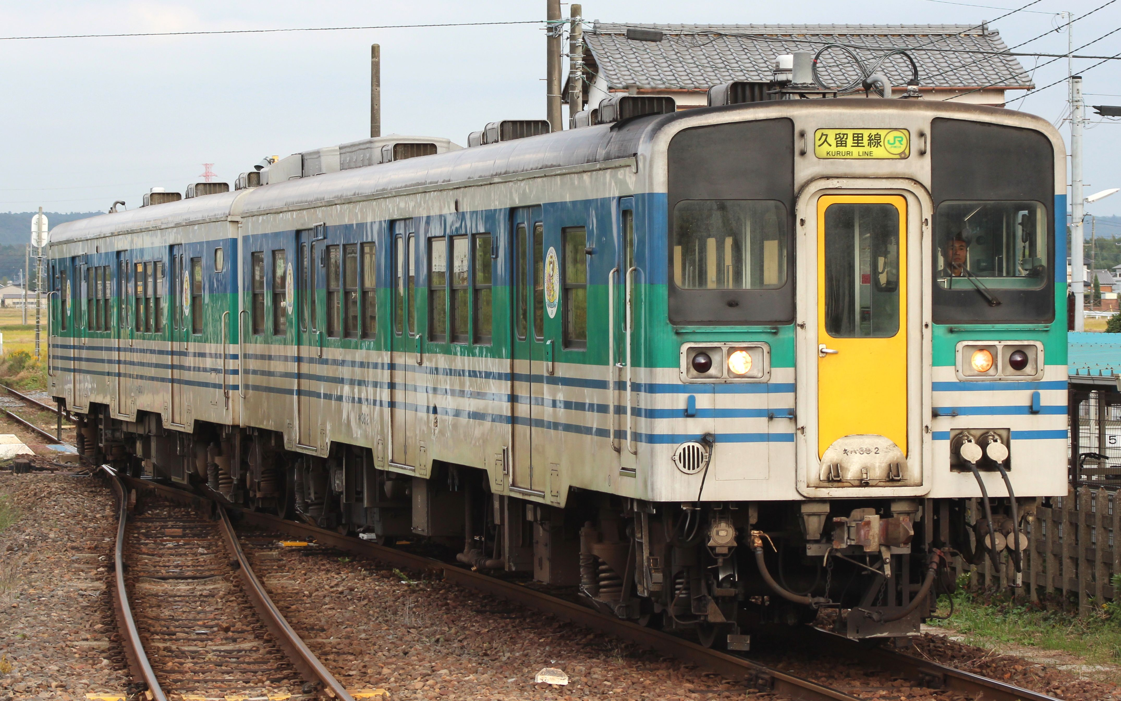 JR東日本キハ38形気動車